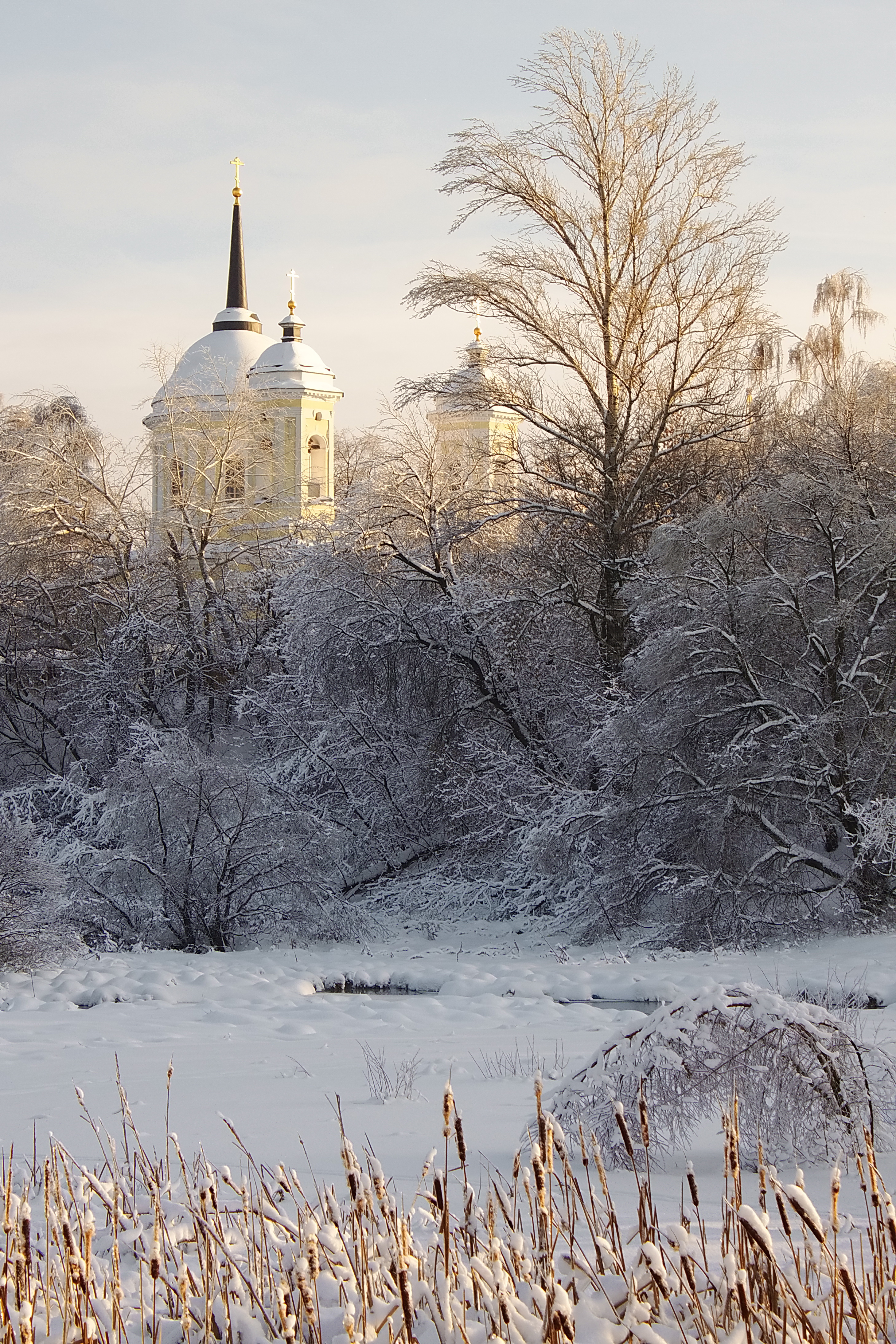 Вид на храм с Горьковского шоссе